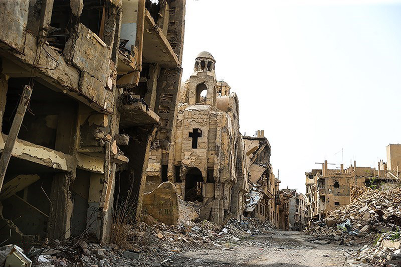 شهر دیرالزور سوریه